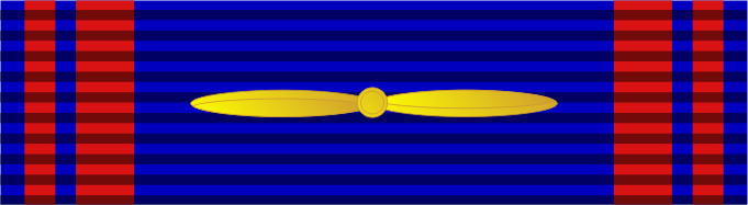 Nastrino: Medaglia d'oro al valore aeronautico (1927-1932).